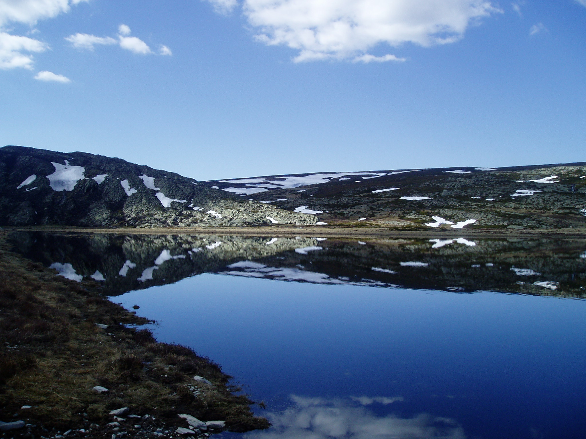 Laguna de Las Yeguas, Parque Natural del Lago de Sanabria y Alrededores.